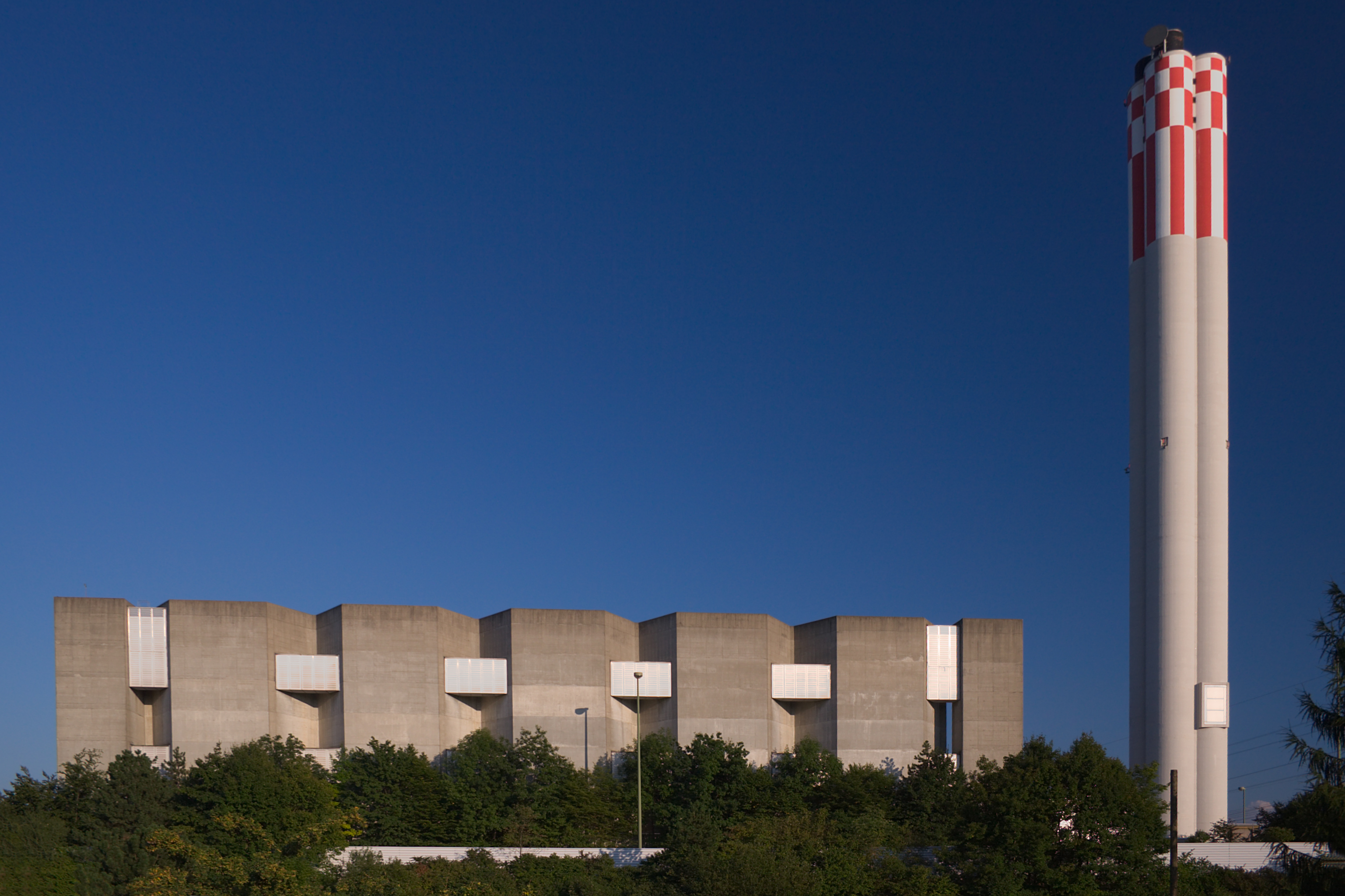 Das Heizkraftwerk Aubrugg in Wallisellen bei Zürich, Schweiz wurde vom Architekten Pierre Zoelly und dem Ingenieurbüro Basler & Hofmann entworfen und 1977 vom Kanton Zürich in Betrieb genommen. Es besitzt zwei Kessel à 80 MW Leistung, welche mit Öl oder Gas befeuert werden können sowie drei Spitzenlastkessel à je 10 MW Leistung. Das Öl wird per Lastwagen geliefert, das Gas per Pipeline. Das Kraftwerk deckt die Spitzenlast im Fernwärmenetz von Zürich ab. Nachdem eine entsprechende Vorlage vom Stadzürcher Stimmvolk gutgeheissen wurde, wurde die Anlage, nicht aber das Land per 1. Januar 2005 vom Kanton der Stadt übertragen. Das Kraftwerk befindet sich im Autobahndreieck Zürich Nord, die Autobahn befindet sich zum Teil auf dem Kraftwerk. Im Oktober 2010 nahm im bestehenden Gebäude ein Holzheizkraftwerk mit 28 MW thermischer und 11 MW elektrischer Leistung den Betrieb auf.Aufnahme von Norden, mit Polfilter